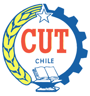 La Central Única de Trabajadores de Chile (CUT), fue la más grande y única central sindical chilena entre 1953 y 1973. Fundada con el objetivo de agrupar a todo el movimiento obrero (disperso hasta ese momento), defender sus derechos y presentar sus demandas. Su primer presidente fue Clotario Blest.